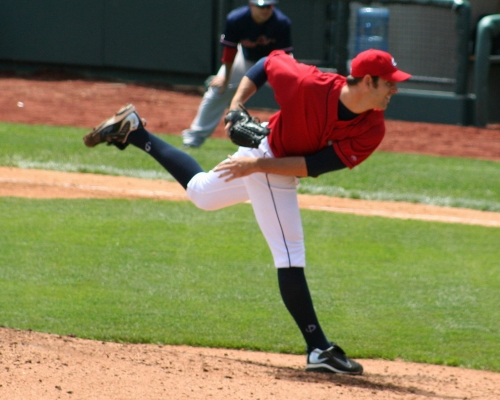 Zach Jackson